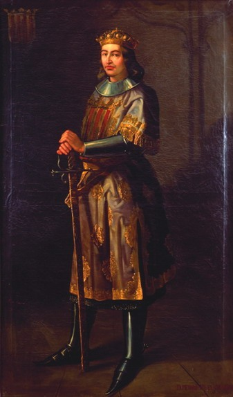 Retrato imaginario del rey Pedro III de Aragón (1240-1285), que fue hijo del rey Jaime I de Aragón y de su segunda esposa, la reina Violante de Hungría.